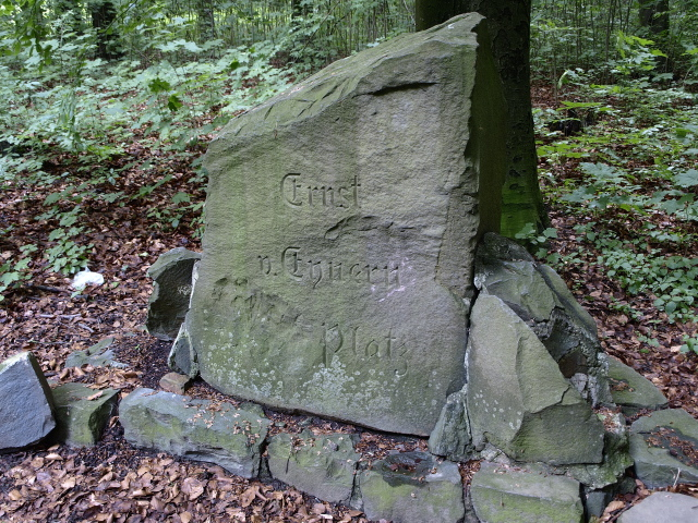 Stein mit der Aufschrift Ernst von Eynern Platz, im nördlichen Teil der Barmer Anlagen, Wuppertal